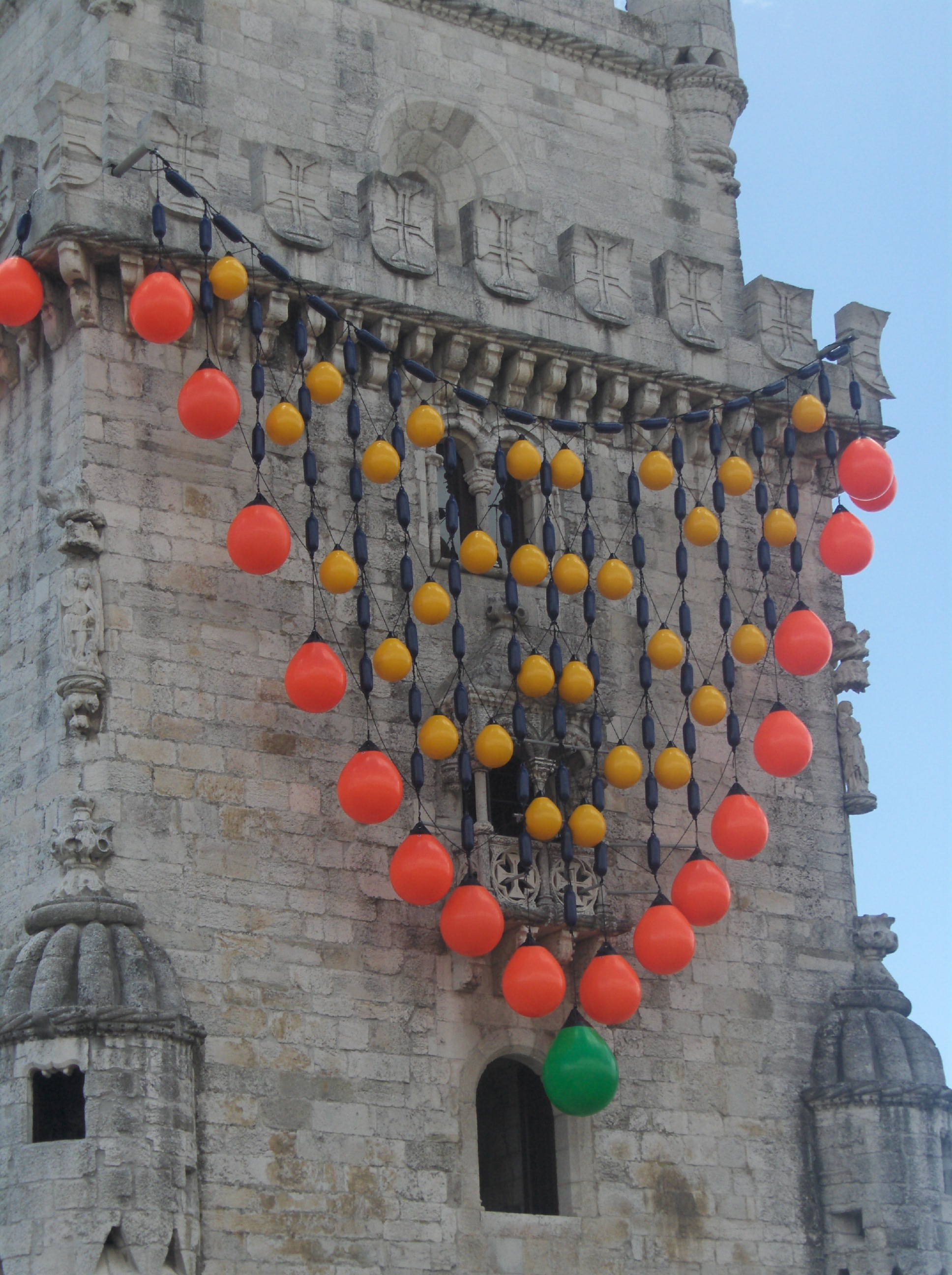 Jóia do Tejo, intalação de Joana Vasconcelos numa das fachadas da Torre de Belém, Lisboa